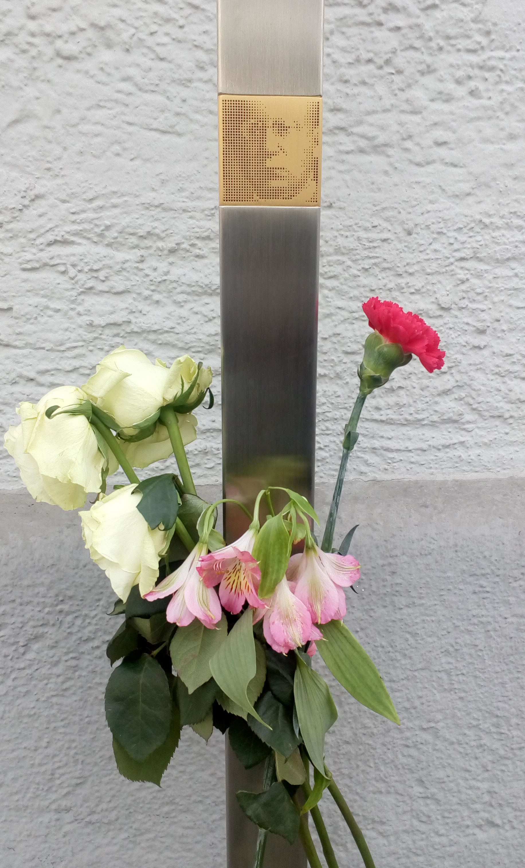 Gedenkstele für den Historiker Michael Strich (1881-1941) angebracht 2019 an seinem ehemaligen Wohnhaus an der Clemensstraße 41 in München im Rahmen des Projekts Erinnerungszeichen für Opfer des NS-Regimes in München.